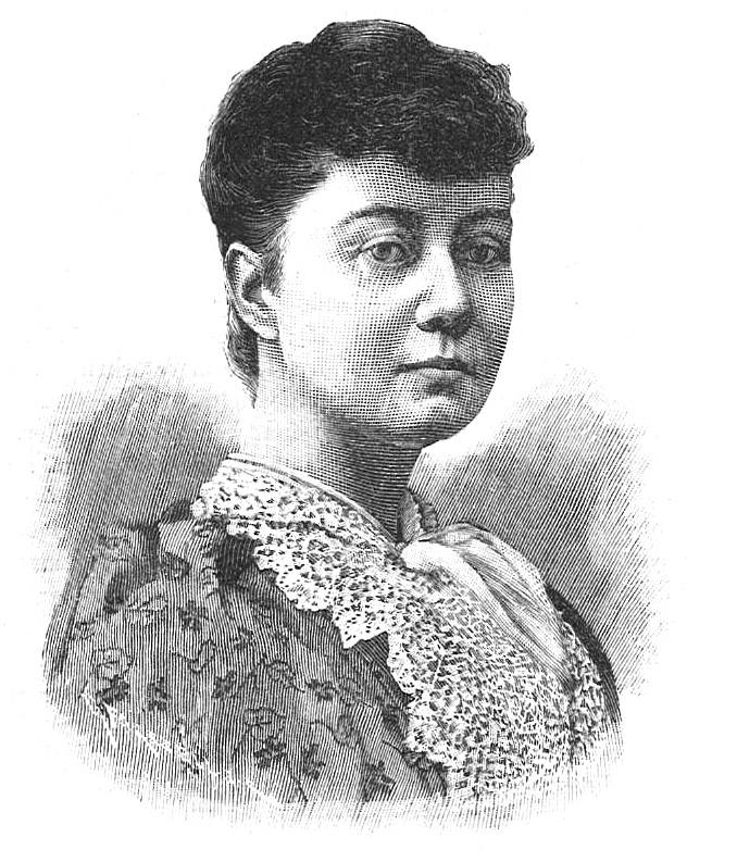 Ellen Jolin (1854-1939)